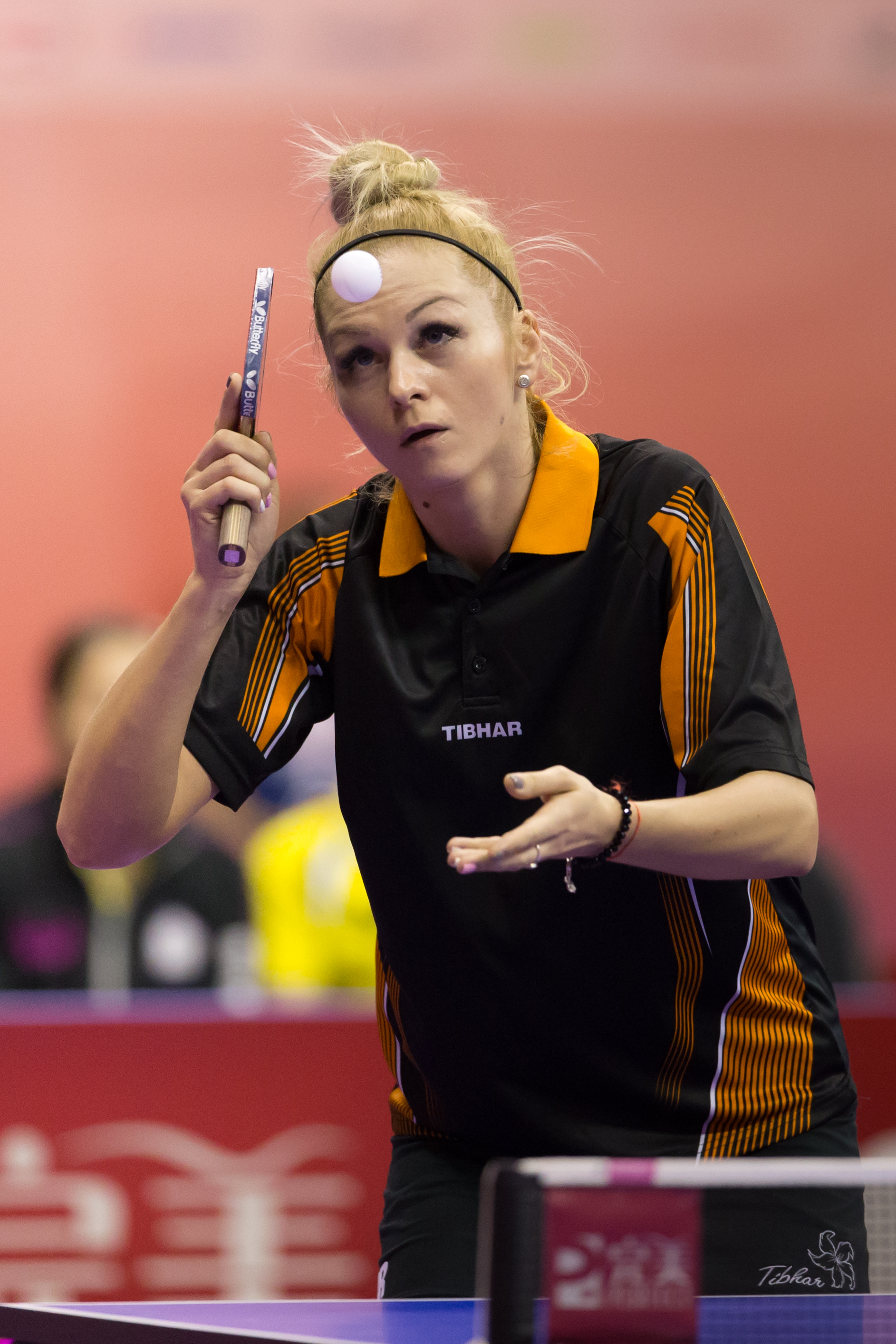 _K0K1737